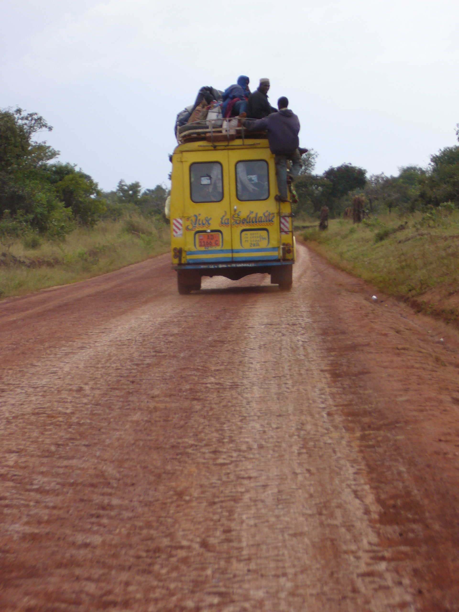 Cameroun - Sur la piste Ngaoundéré-Idool-Balam, minibus bien chargé This is an image with the theme "Africa on the Move or Transport" from: Cameroon